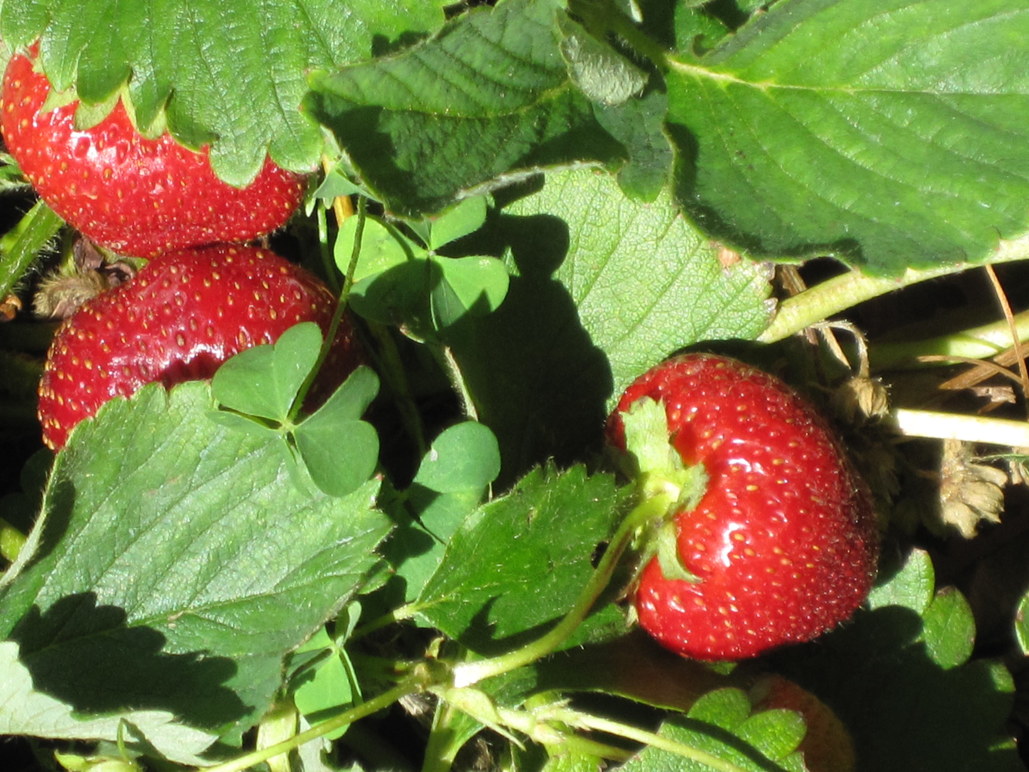 Frutti di fragola